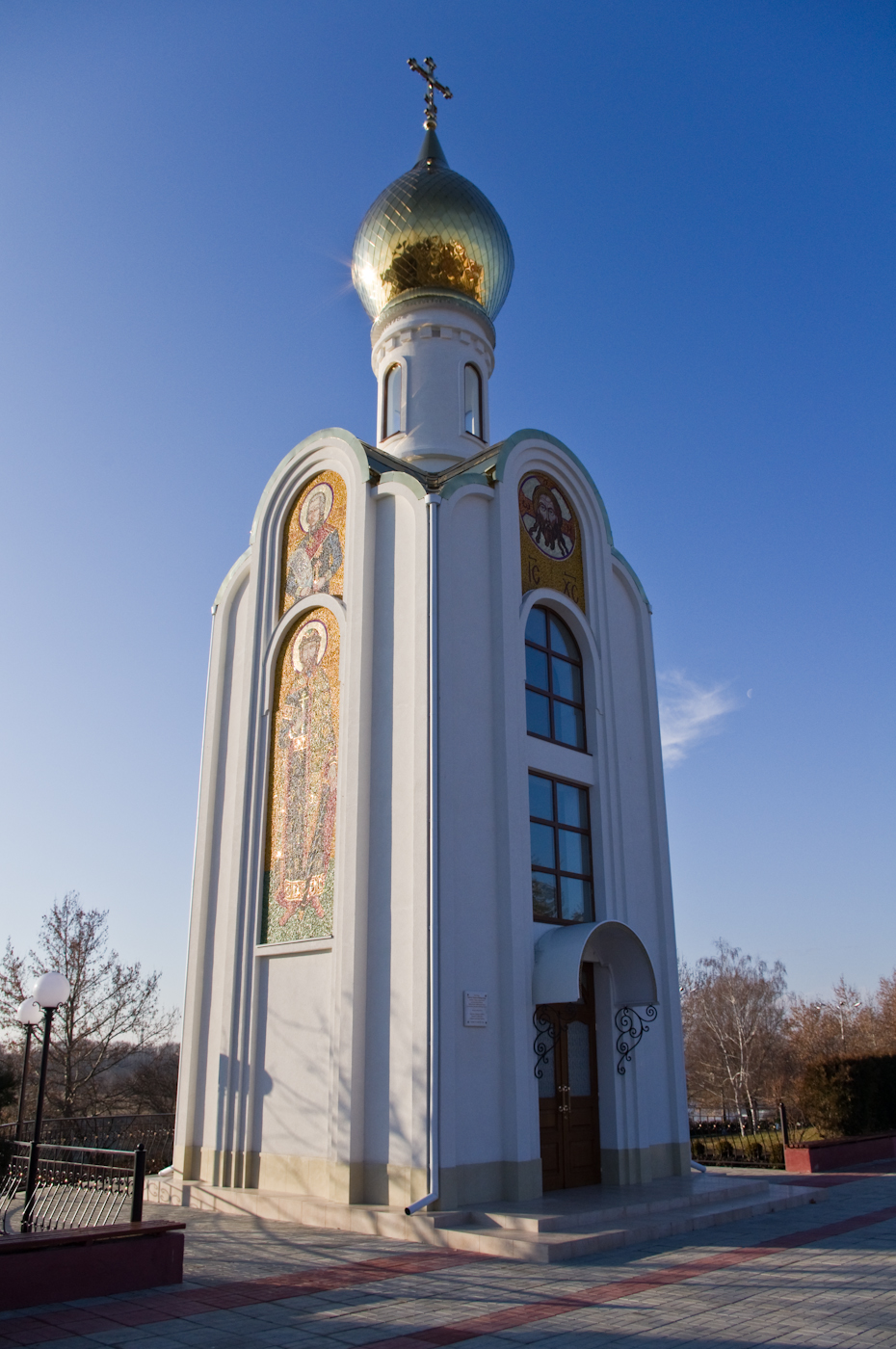 Мемориал Славы в Тирасполе